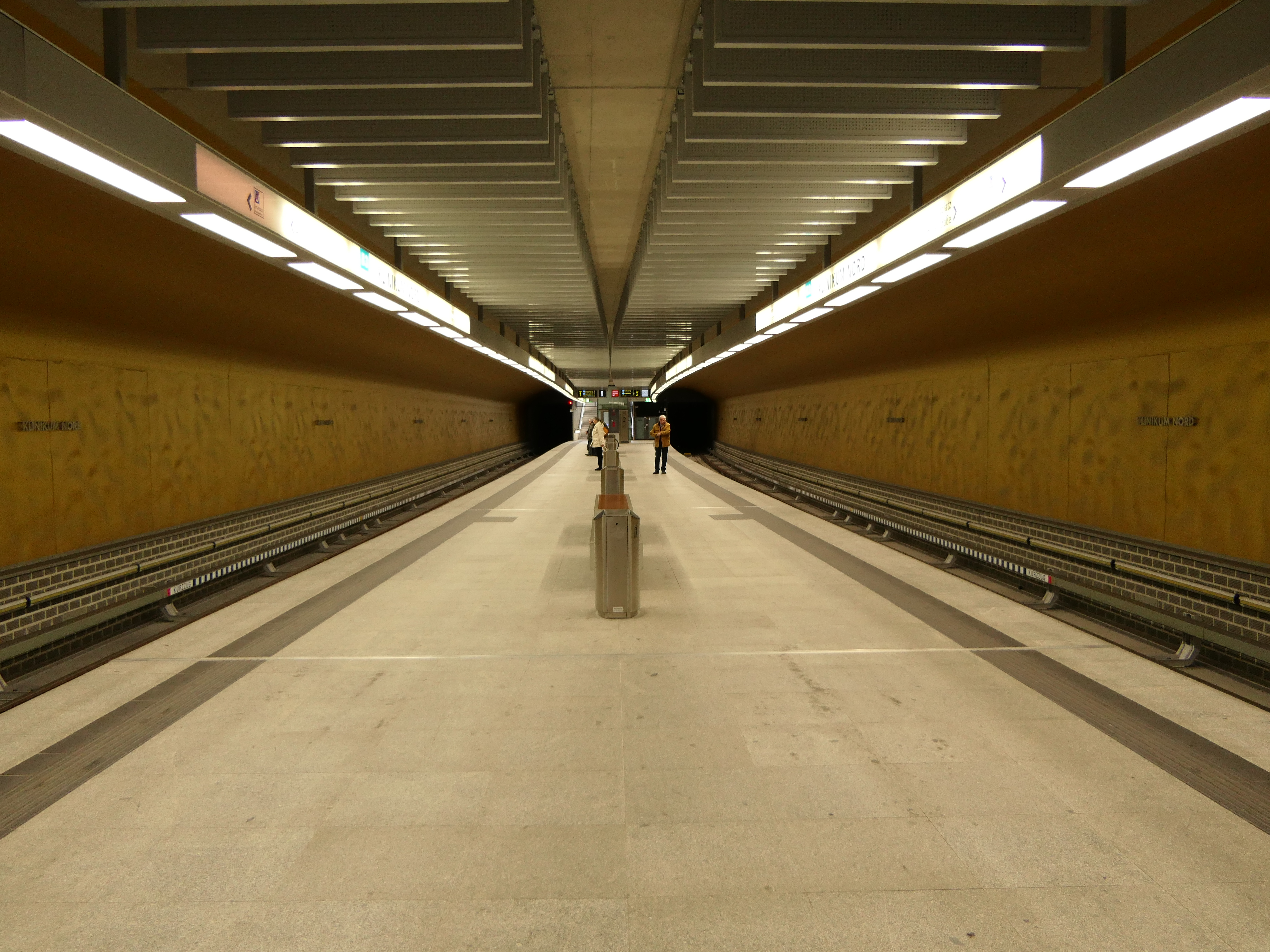 Blick auf die Bahnsteigebene am U-Bahnhof Klinikum Nord in Nürnberg.